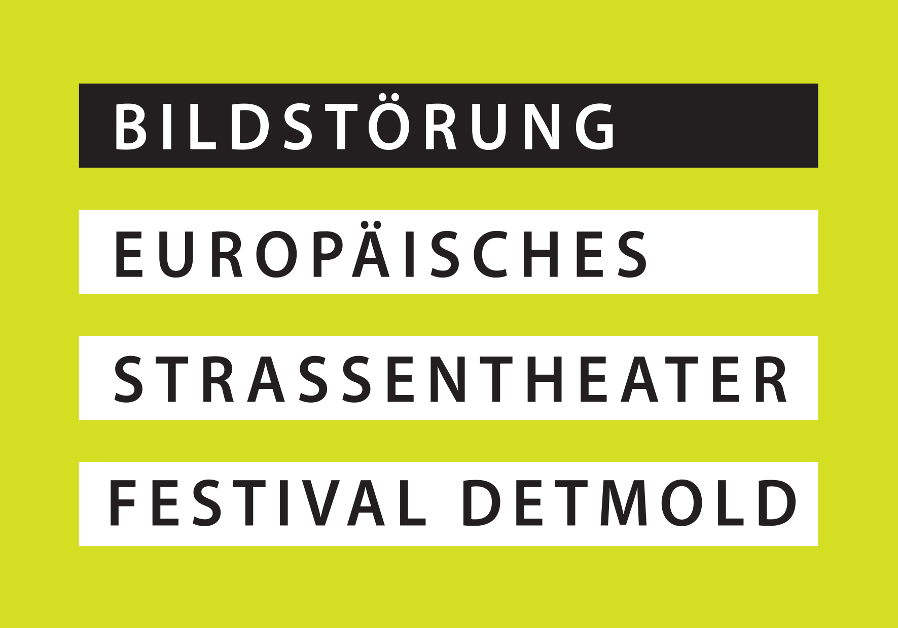 Das aktuelle Logo vom ESTF